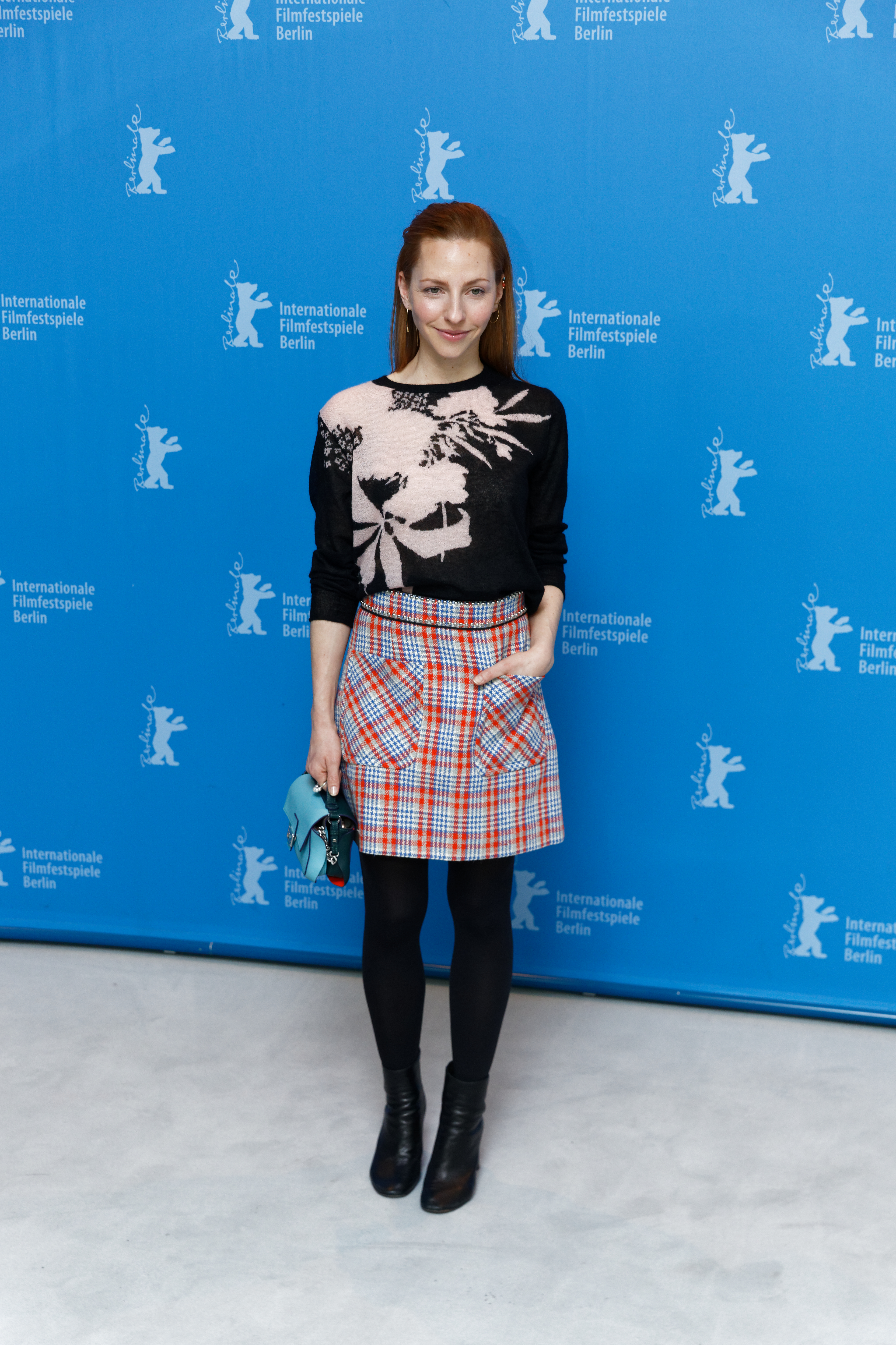 Katharina Schüttler beim Photo Call von Kongens Nei (The King's Choice) bei der Berlinale 2017